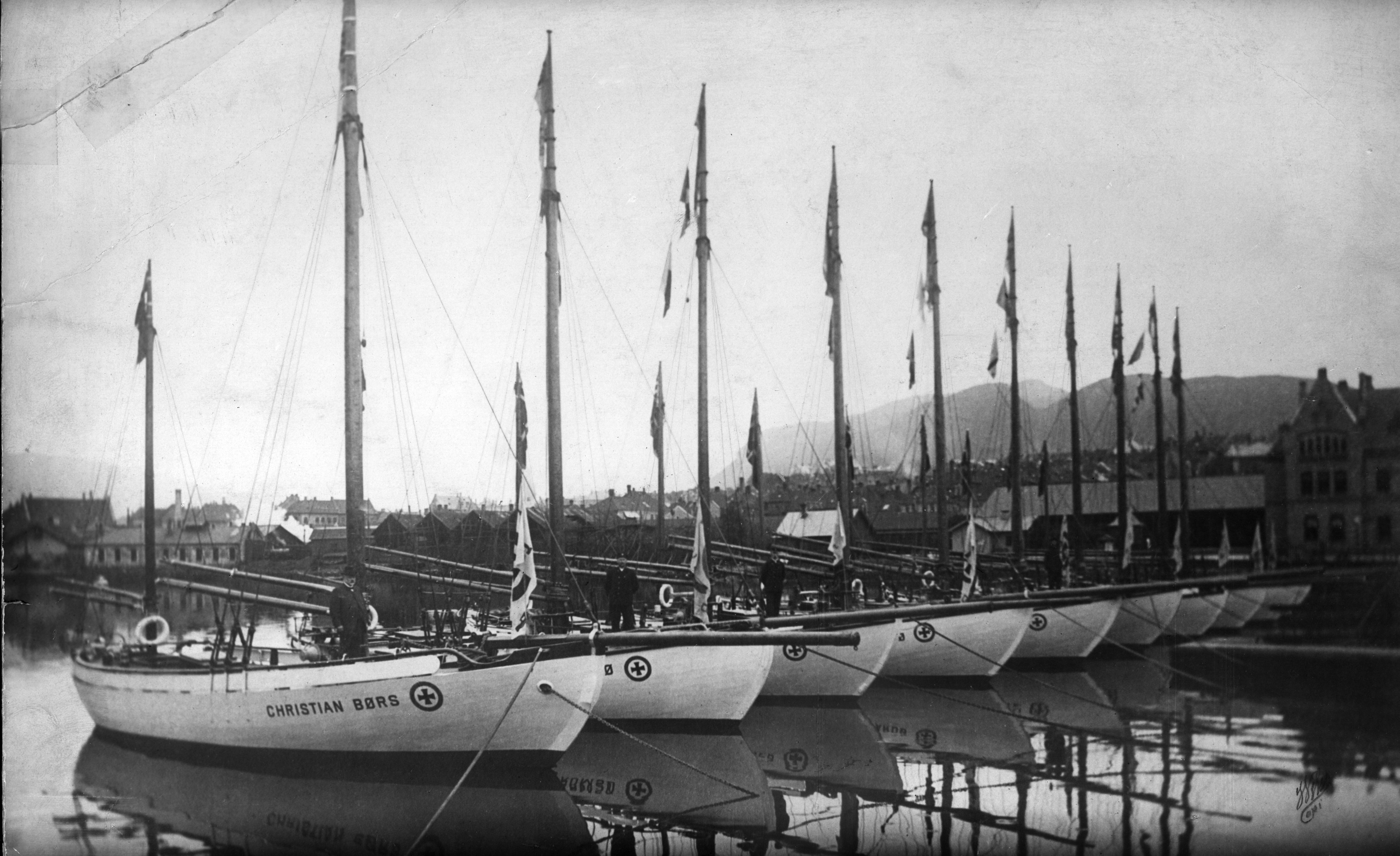 Bildet er trolig fra Lundgårdsvannet i Bergen, ved anledningen "Landsutstilling" og internasjonal fiskeriutstilling i Bergen 1898.